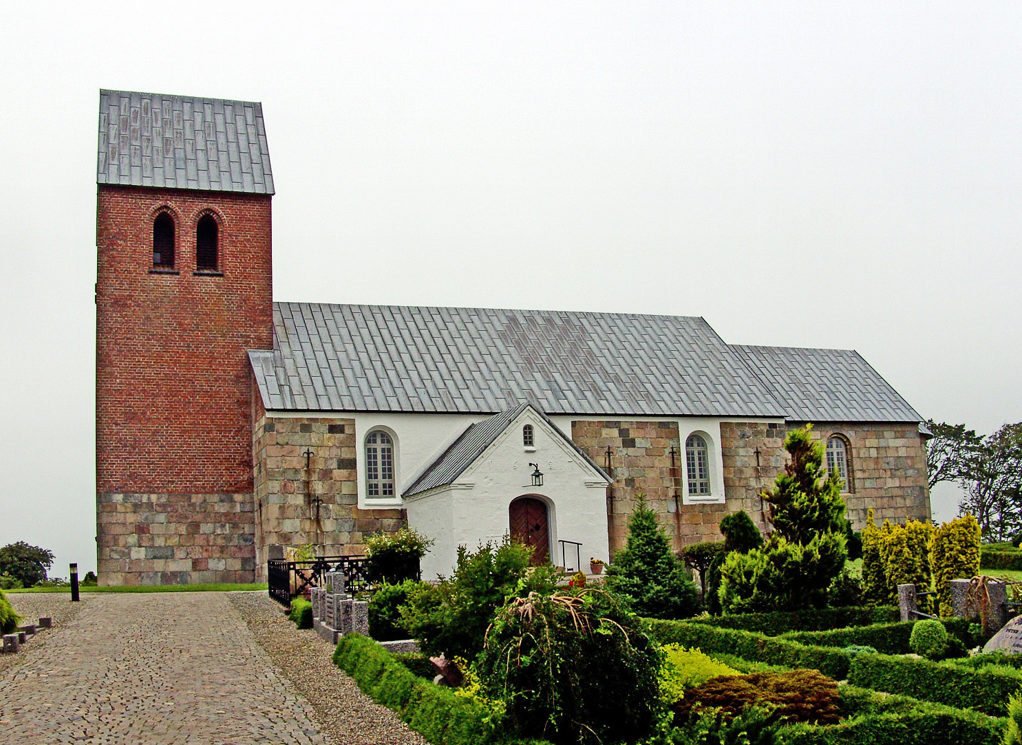 fra syd